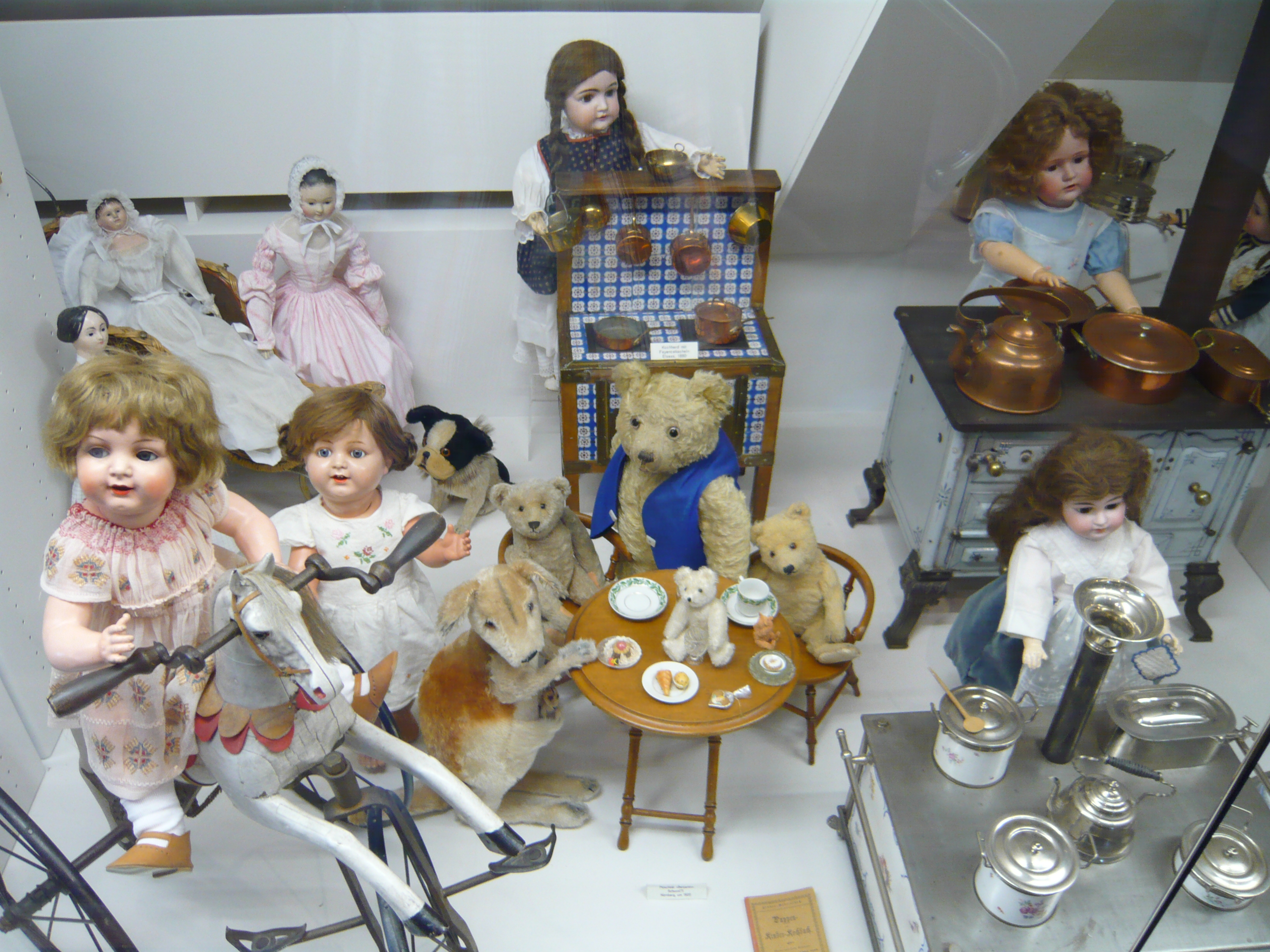 aufgenommen im Zürcher SpielzeugmuseumNative nameZürcher SpielzeugmuseumLocationZürich, SwitzerlandCoordinates47° 22′ 23.15″ N, 8° 32′ 23.22″ EEstablished1956WebsiteZürcher Spielzeugmuseum